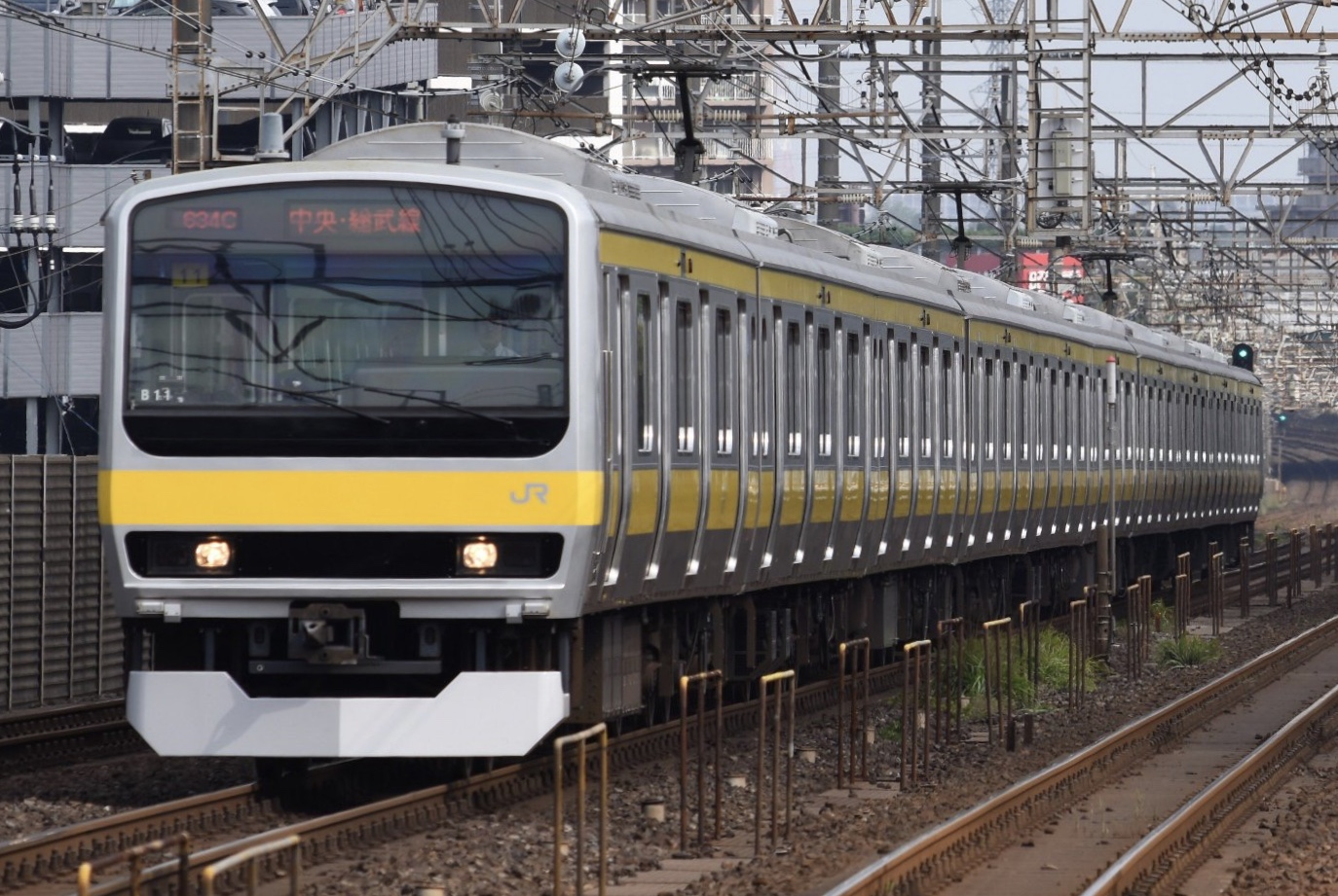 JR稲毛駅にて撮影、E231系0番台ミツB11編成